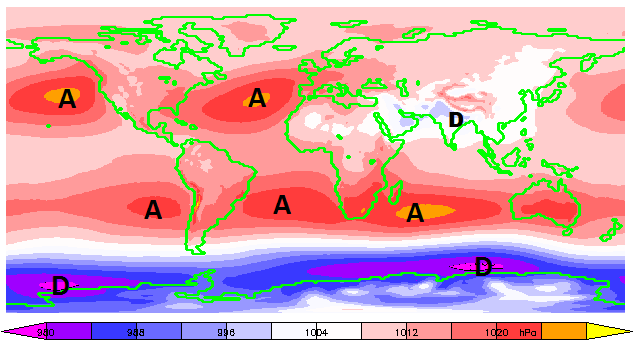 Pression moyenne au niveau de la mer montrant la positions des anticyclones (A) et des dépressions (D) semi-permanentes durant les mois de juin, juillet et août. Ces entités météorologiques, appelées centres d'action sont créés par la circulation atmosphérique générale, la température des mers et le relief.